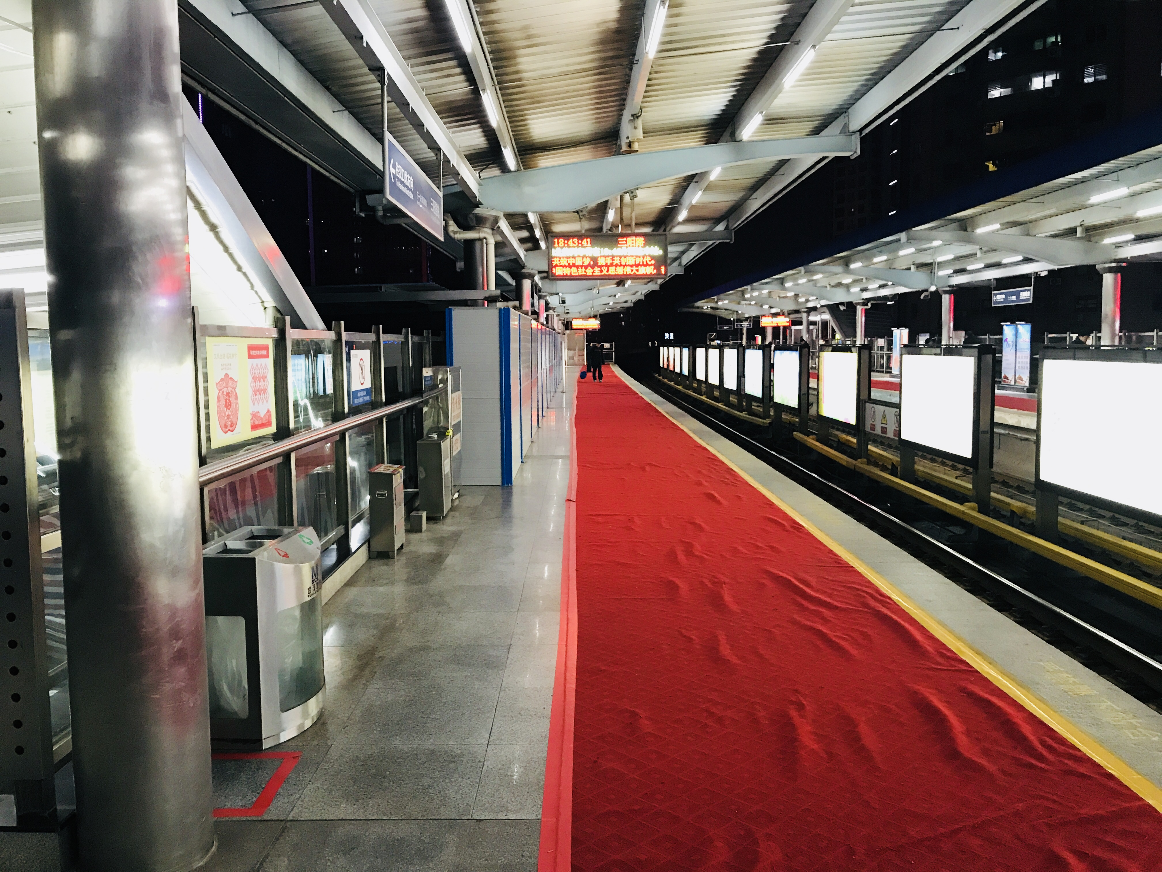 中文（中国大陆）: 武汉轨道交通1号线三阳路站月台